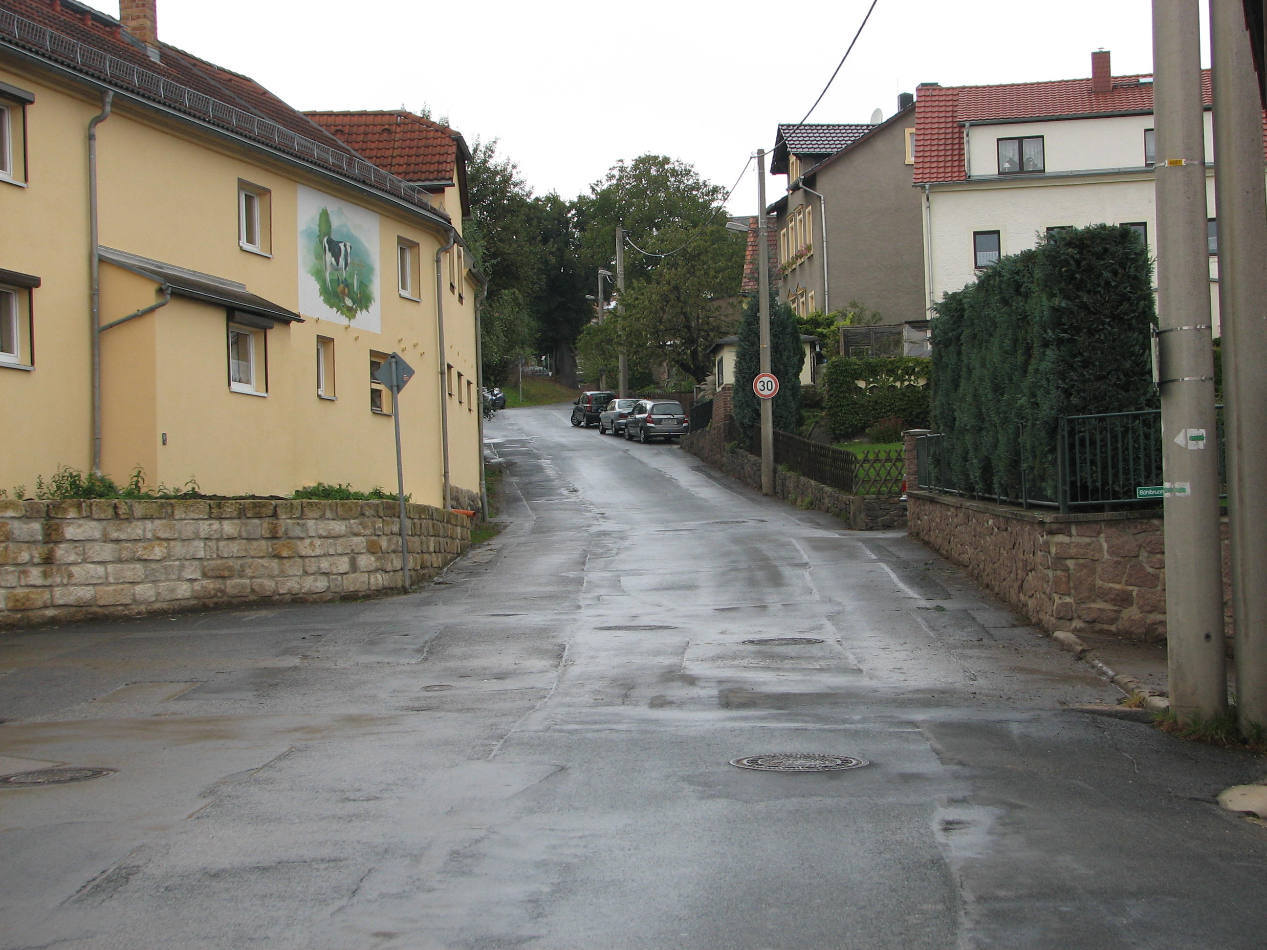 Straße "Zöllmener Straße" in Freital-Wurgwitz